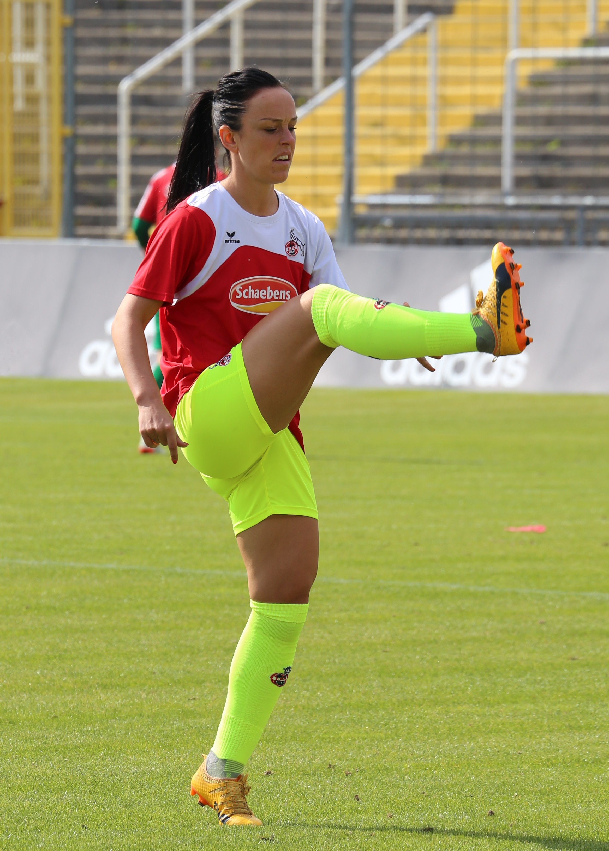 Peggy Nietgen, 1. FC Köln, beim Aufwärmen vor dem Frauen-Bundesliga-Spiel FC Bayern München gegen 1. FC Köln am 24. September 2017 im Stadion an der Grünwalder Straße (Ergebnis war 2:0)